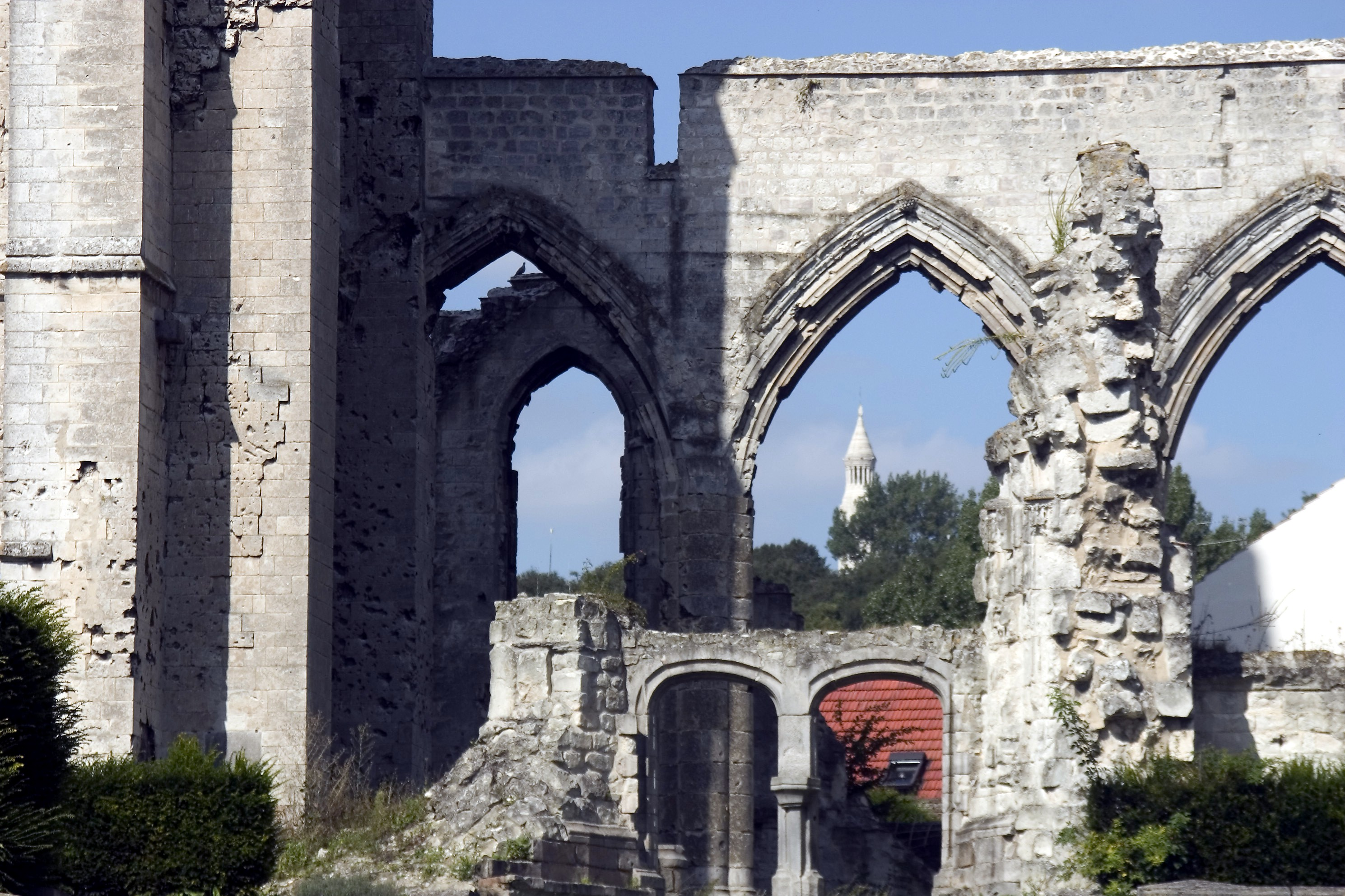 Les ruines de l'église d'Ablain-Saint-Nazaire